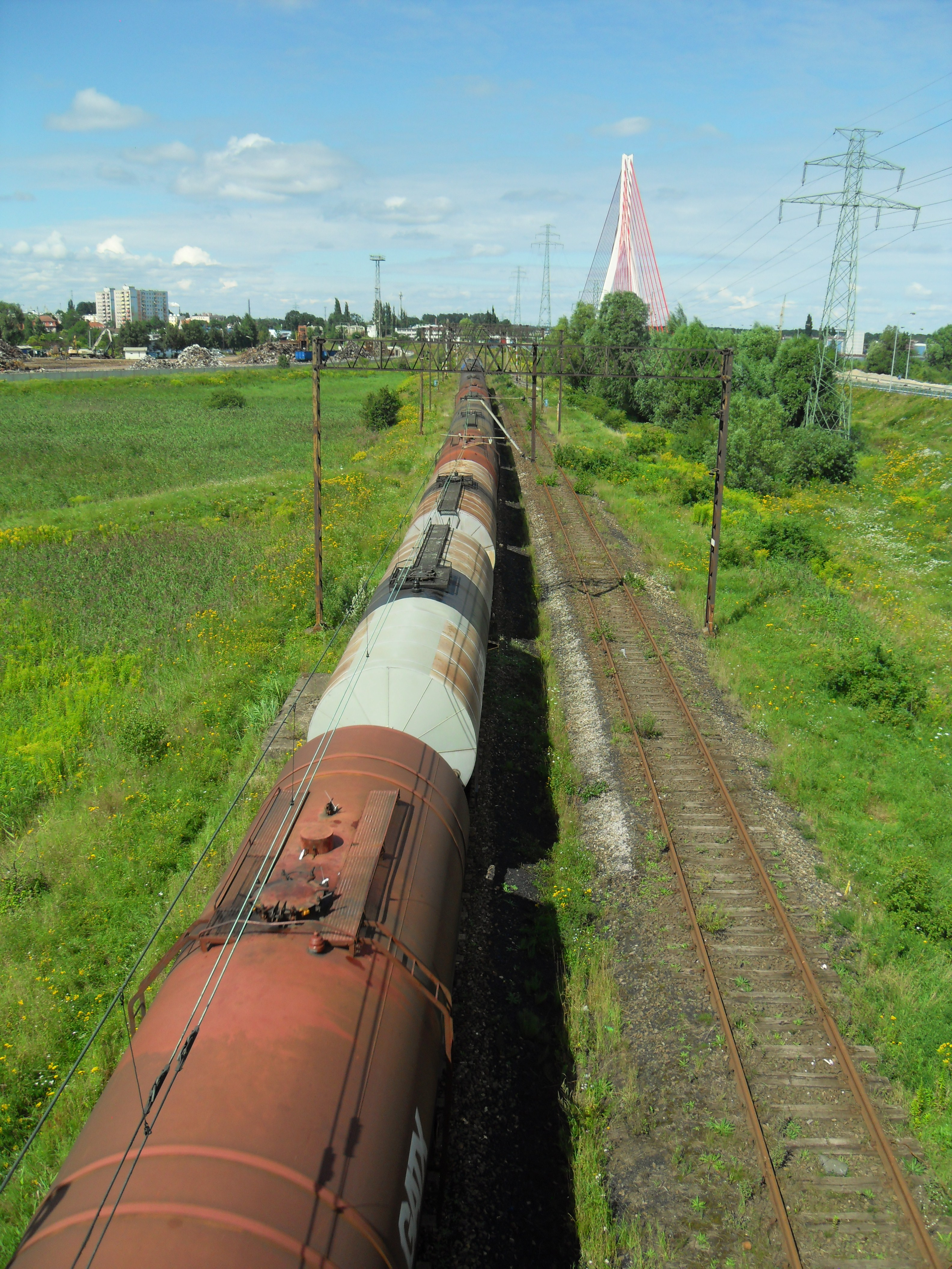 Gdańsk Rudniki, linia kolejowa nr 226.